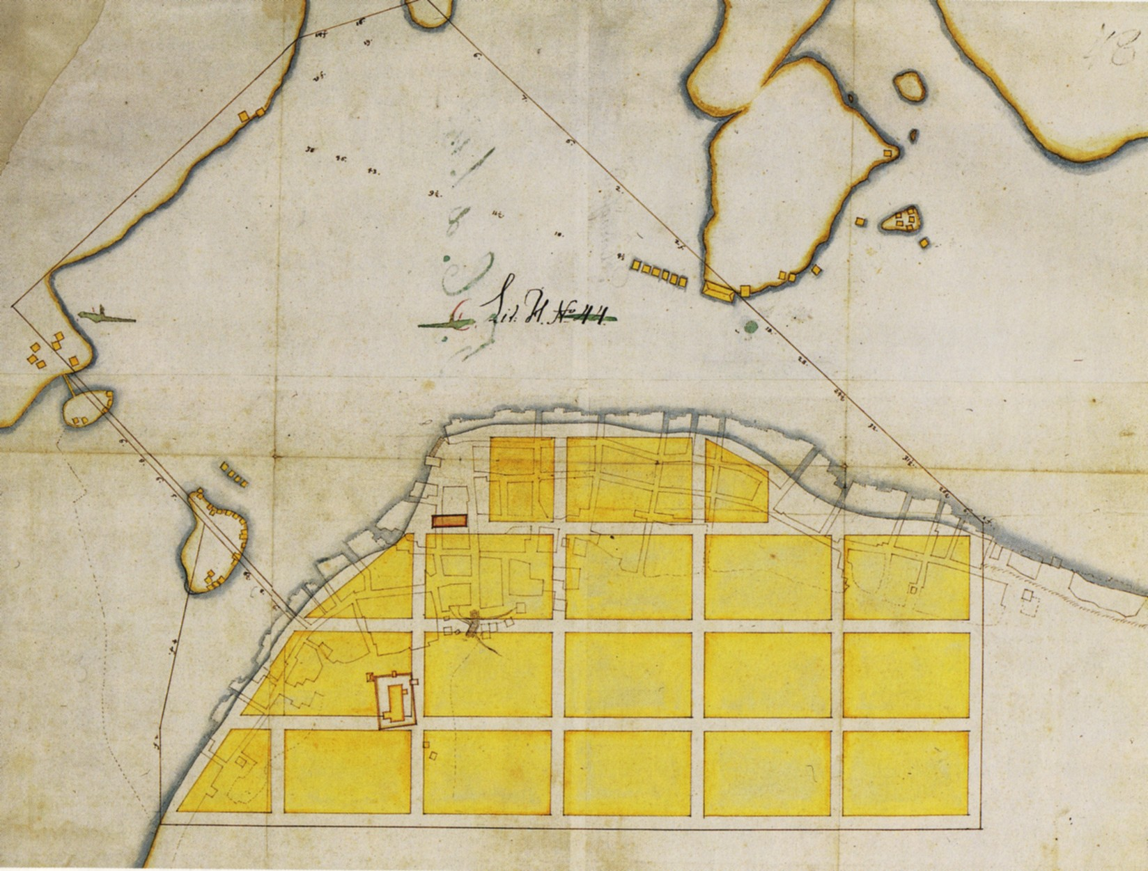 Förslag till reglering av Härnösand troligen upprättat av Nicodemus Tessin d.ä.